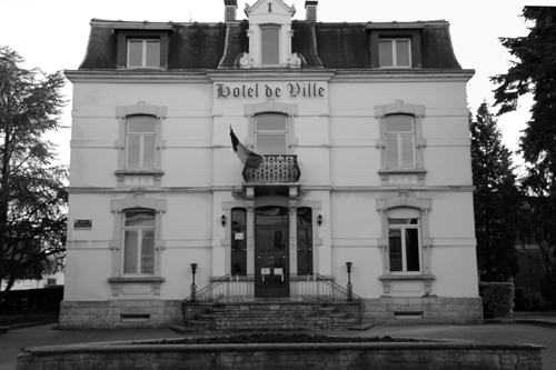 L'hôtel de ville de la commune d'Aubange à Athus (Belgique)